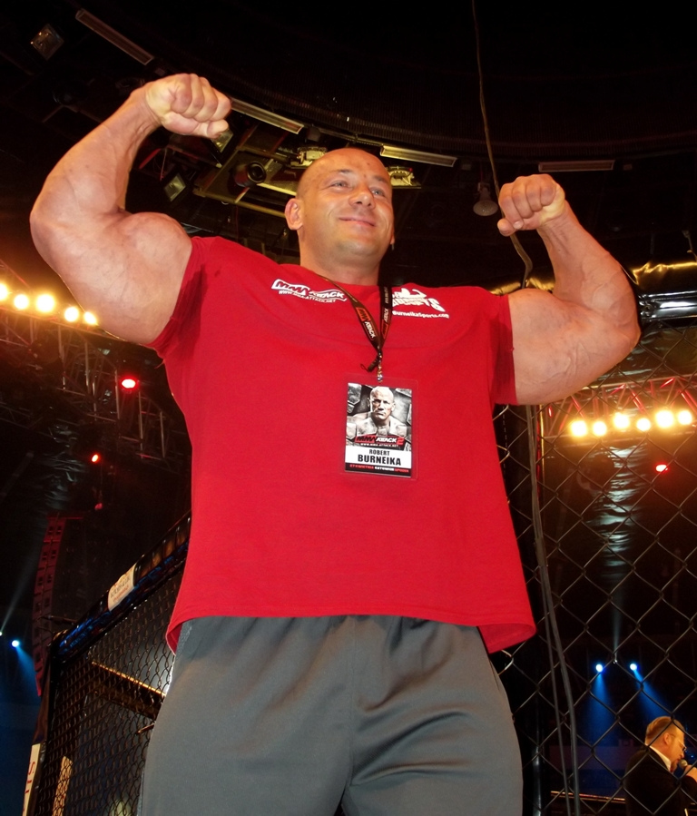 Robert Burneika podczas MMA Attack 2